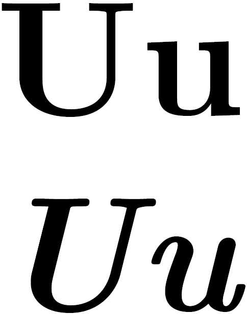 Latin letter U